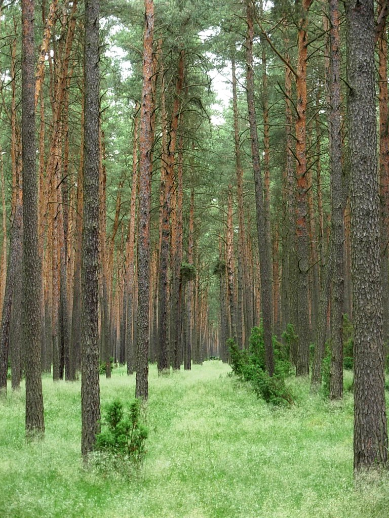 Puszcza Bydgoska - bór w leśnictwie Niedźwiadki